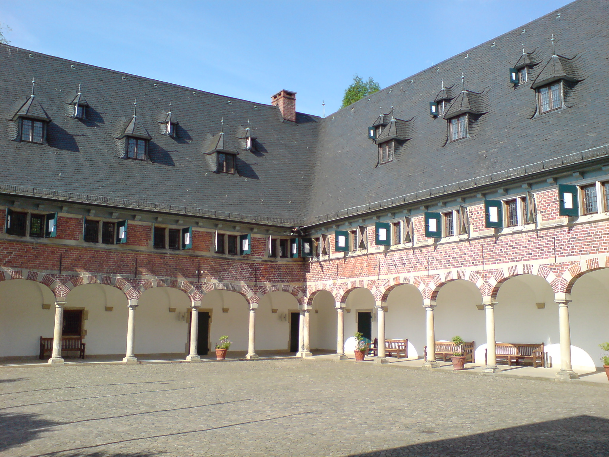 Schloss Reinbek, Hof, 2008